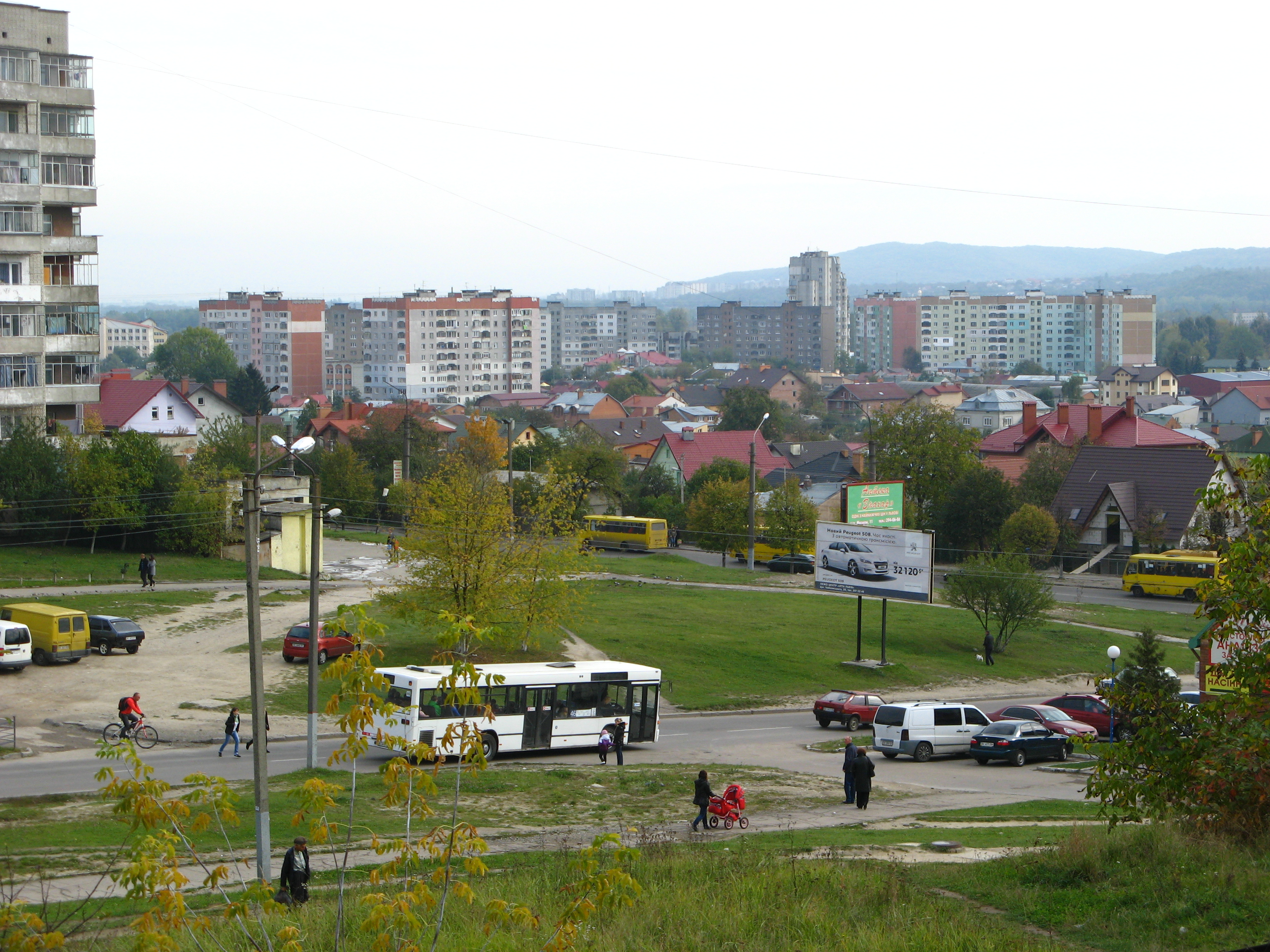 Район Збоїща (Львів): Район Збоїща (Львів)